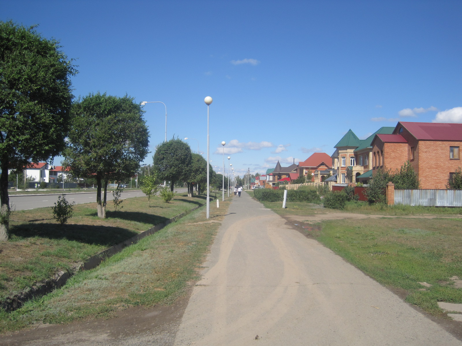 пр. Абая